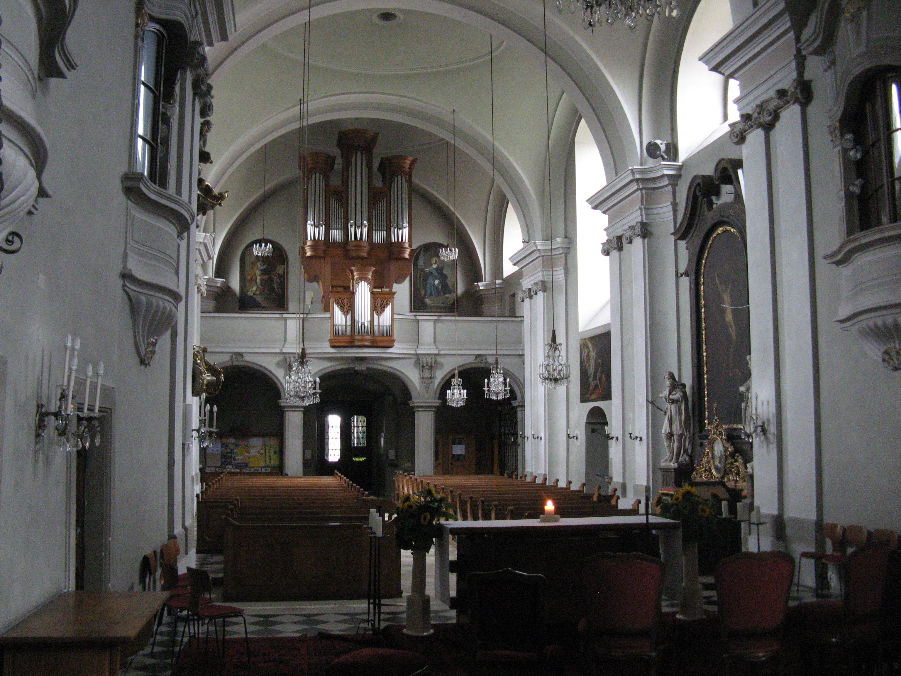 Innenraum nach hinten, Pfarrkirche, Hauptplatz 5, Schwechat